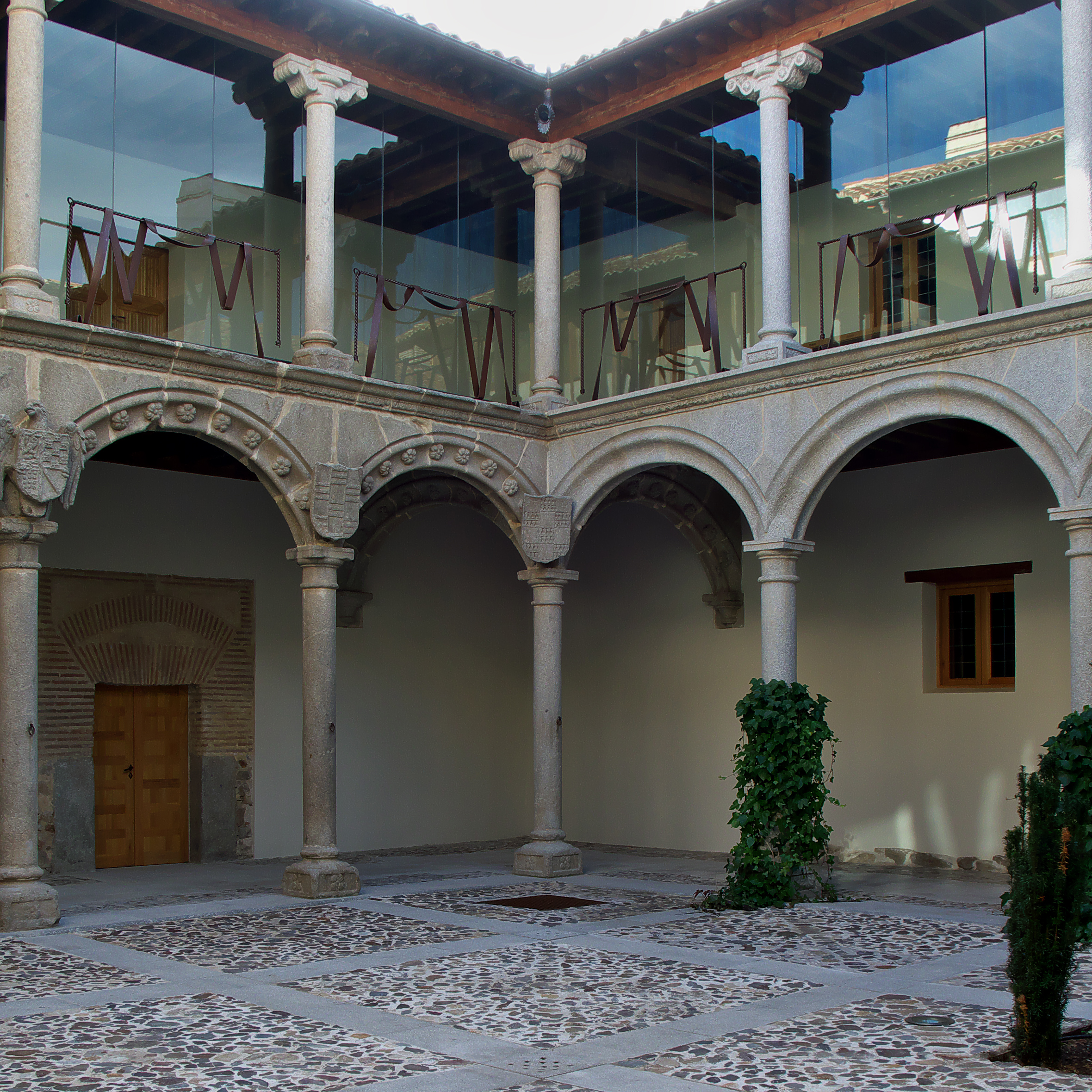 Suero del Águila y Magdalena de Velasco, su esposa, promueven la edificación de este palacio (h. 1522), primer renacimiento en la ciudad de Ávila o plateresco. Interviene en la construcción de este patio el cantero Juancho de Mondigana.